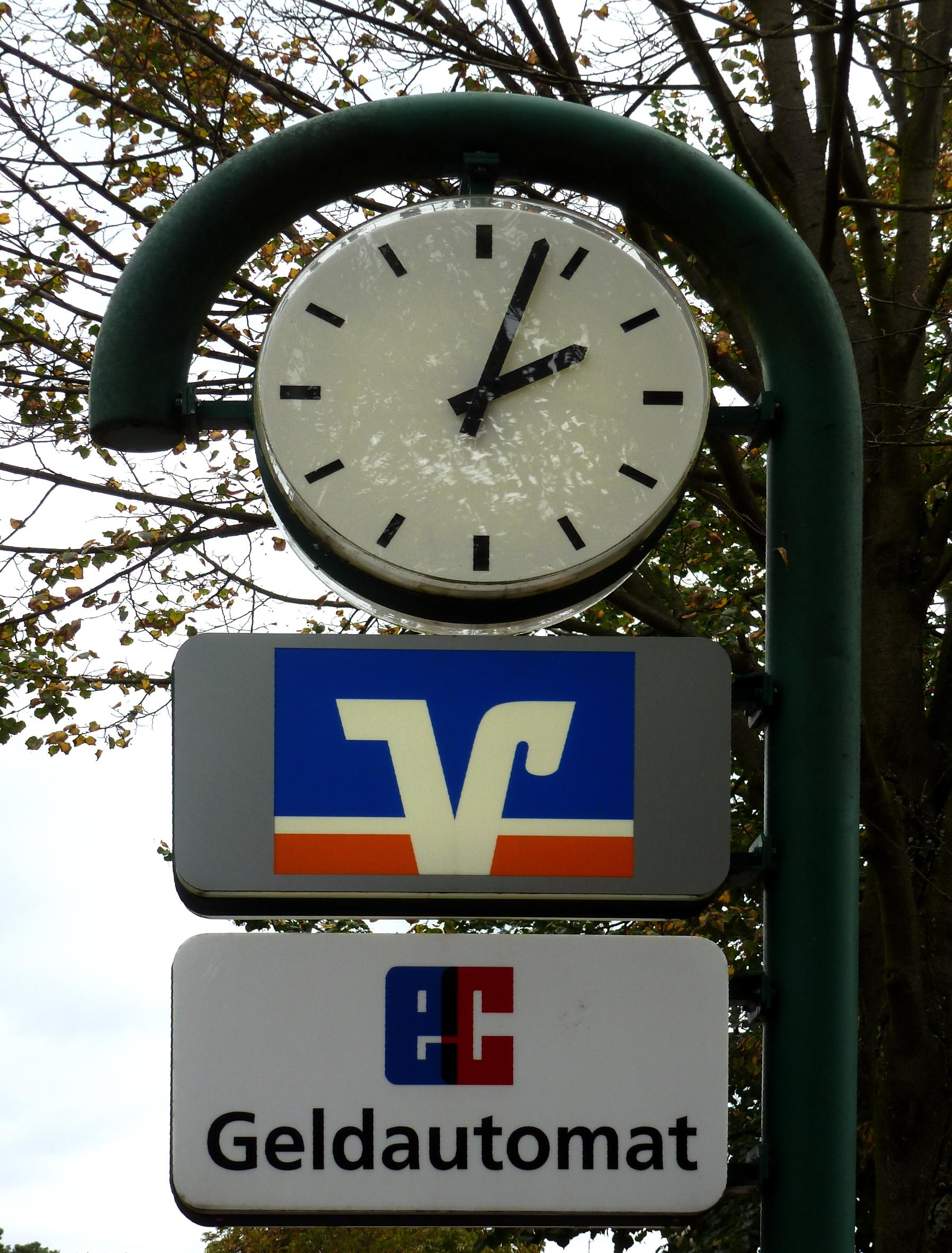 Öffentliche Uhr in Faßberg mit dem Logo der Volksbanken, Niedersachsen, DE.